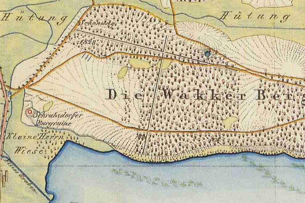 Karte der Burg Schrabsdorf, Teschendorf, Kreis Ruppin, Provinz Brandenburg, 1840